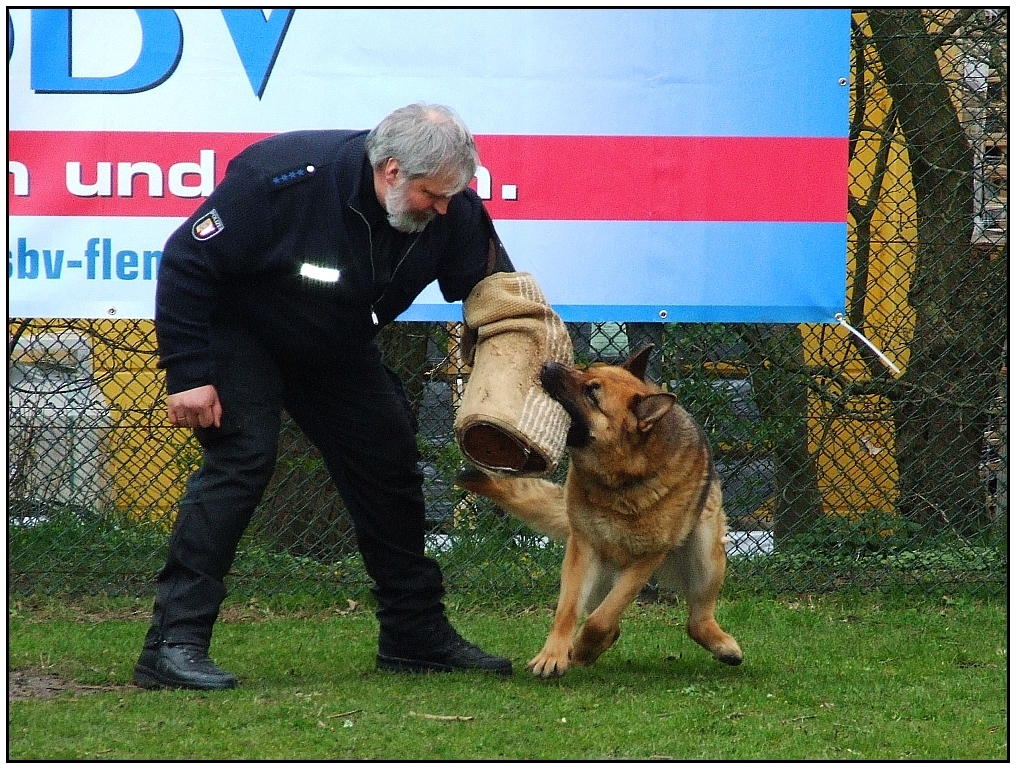 Polizeihund und Hundeführer bei der Ausbildung